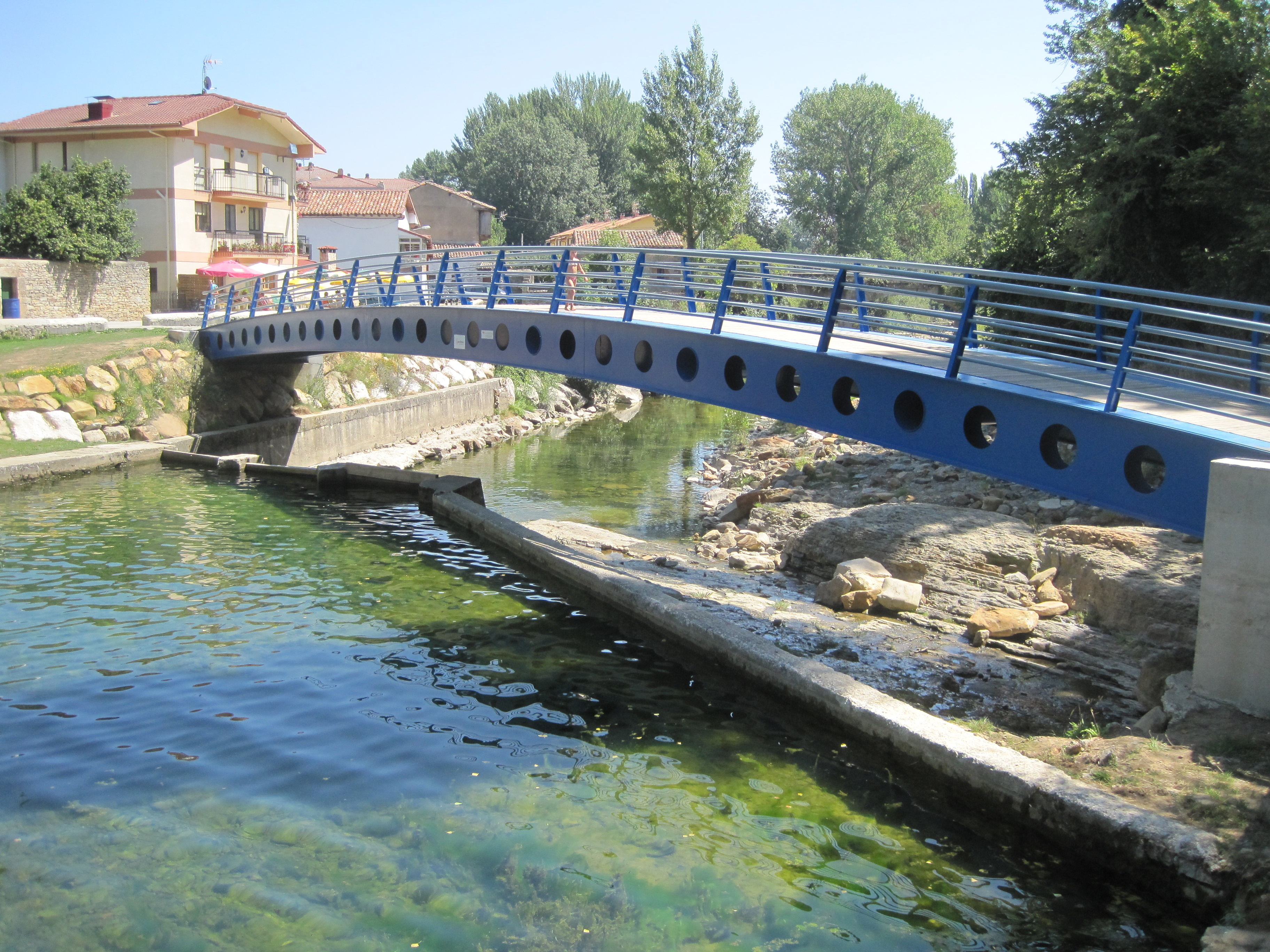 Río Trueba a su paso por Espinosa de los Monteros.